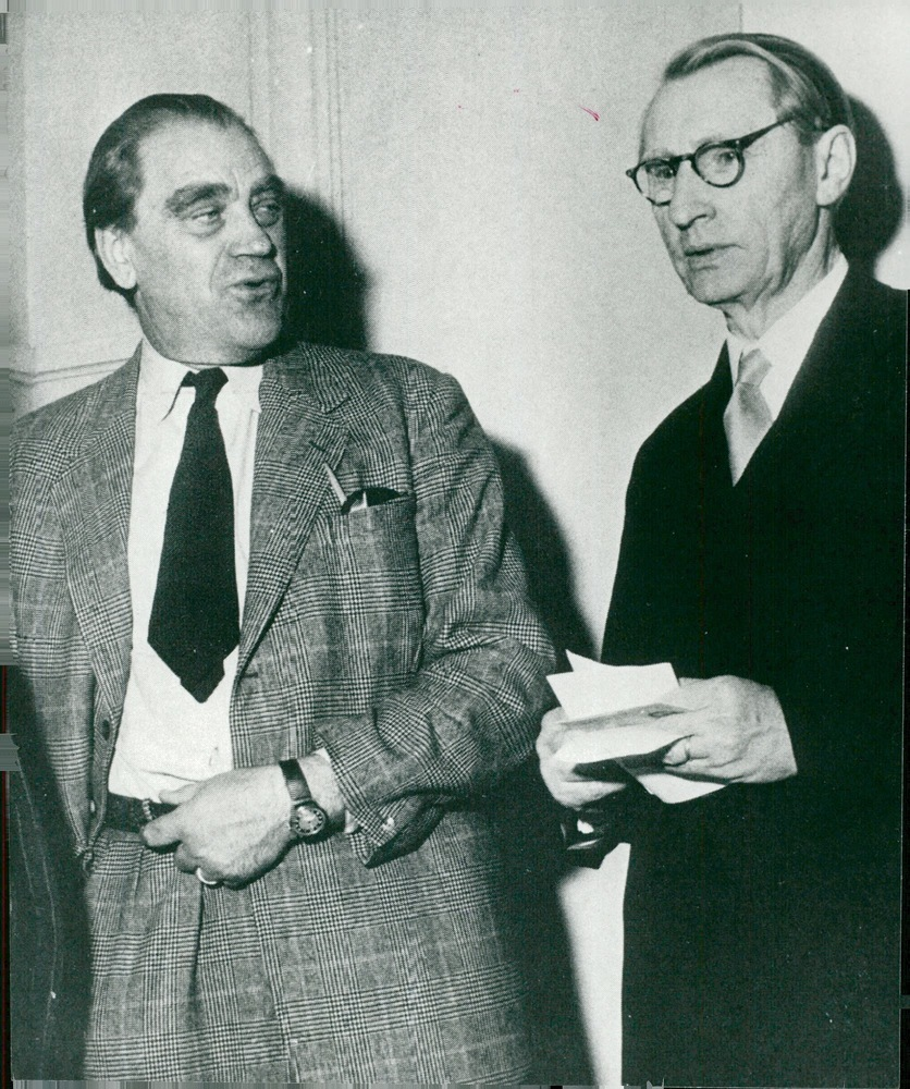 Vilhelm Moberg och pastor J.W. Johnsson.